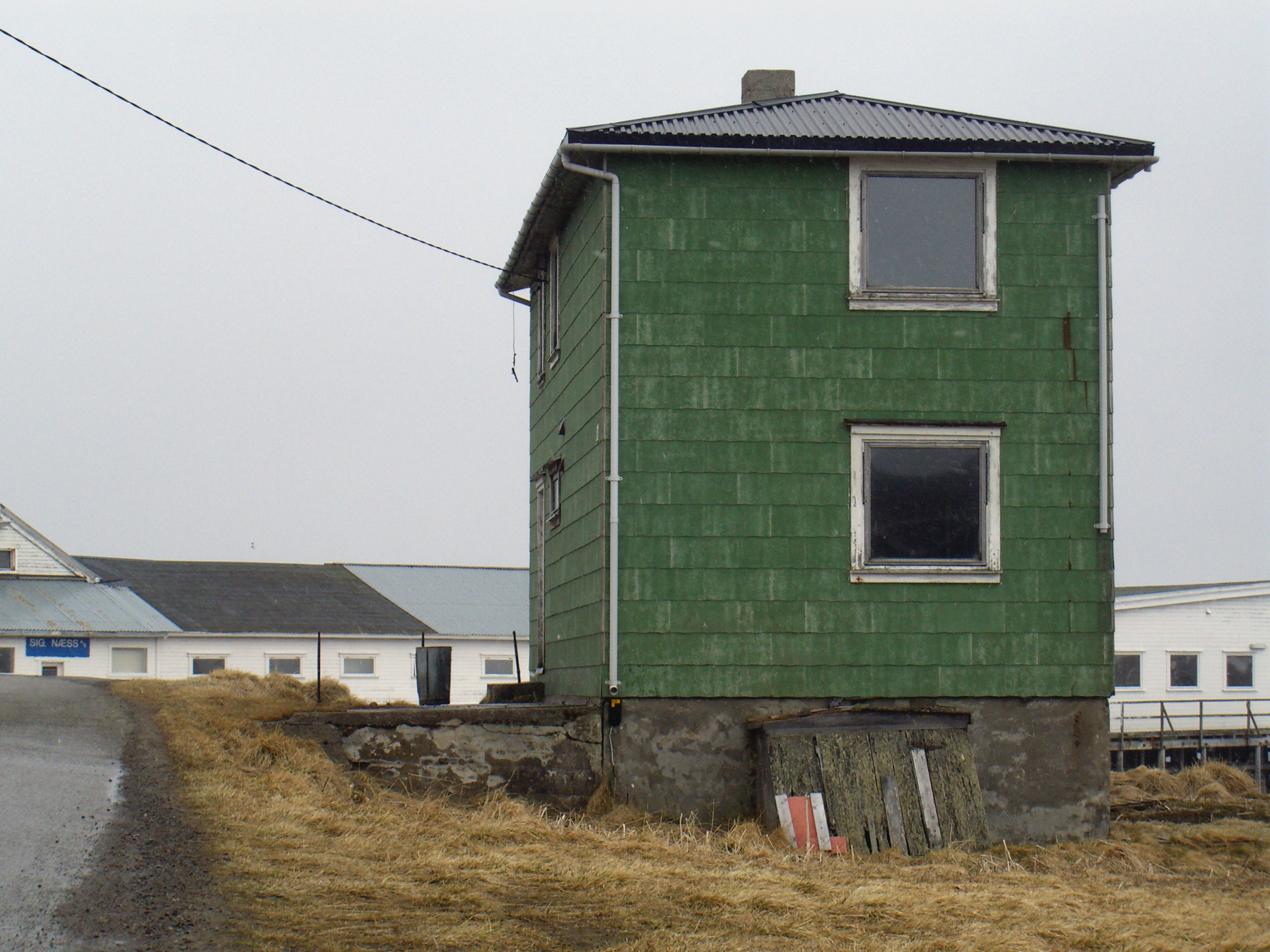 Kiberg